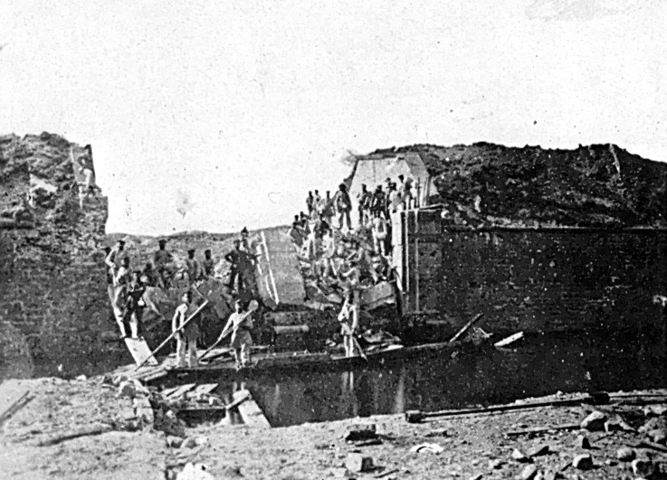 Deutsch-Französischer Krieg, Belagerung von Straßburg, Bresche beim Steintor